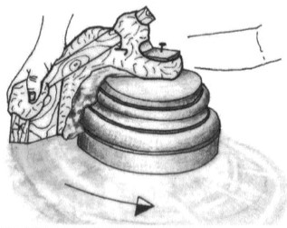 Pour la réalisation d'une base de colonne par exemple.